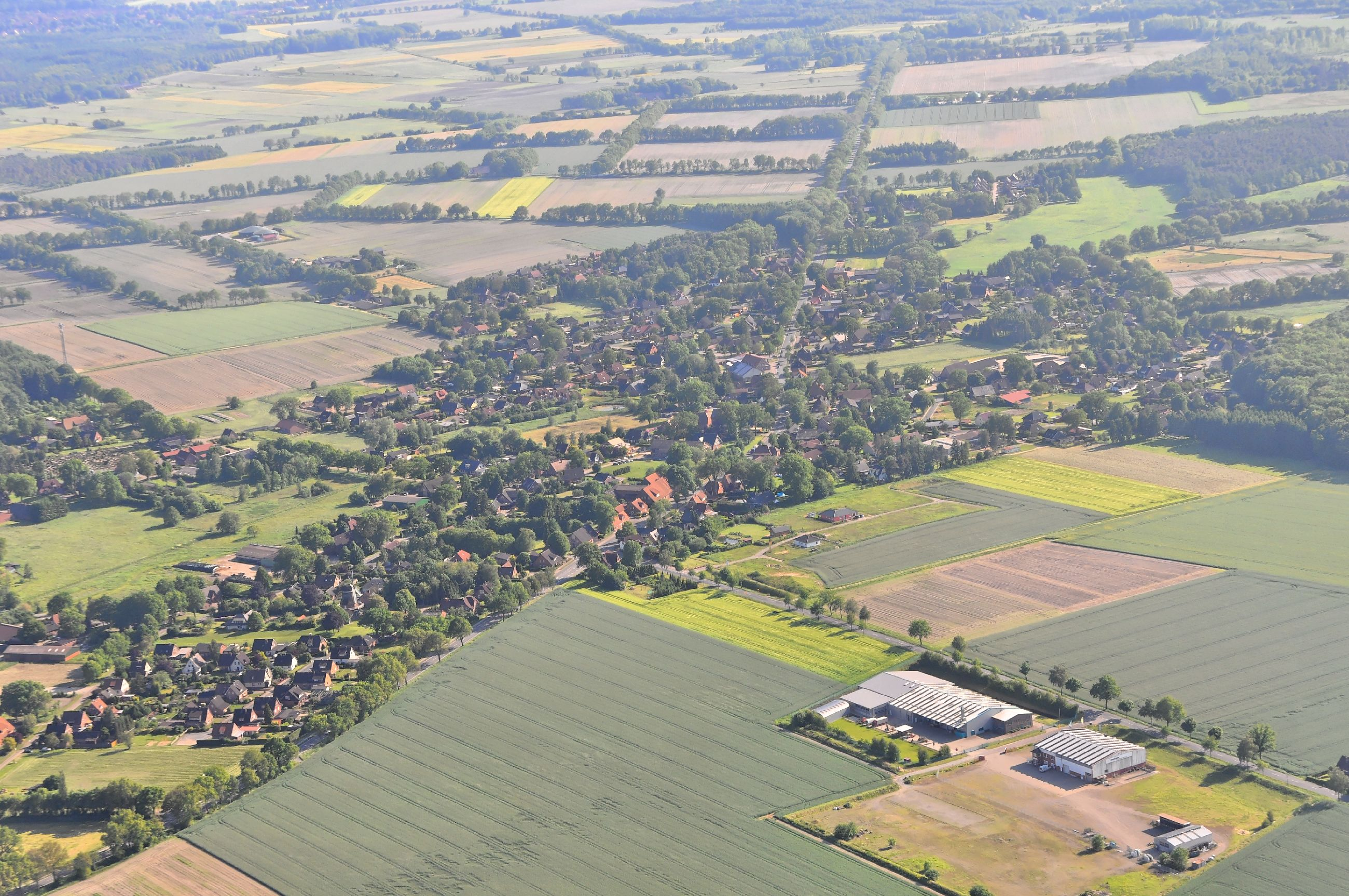 Überführungsflug vom Flugplatz Nordholz-Spieka über Lüneburg, Potsdam zum Flugplatz Schwarzheide-Schipkau